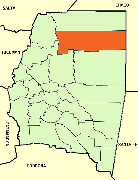 Departamento Mapa editado de: Santiago del Estero province (Argentina), departments and capital.png